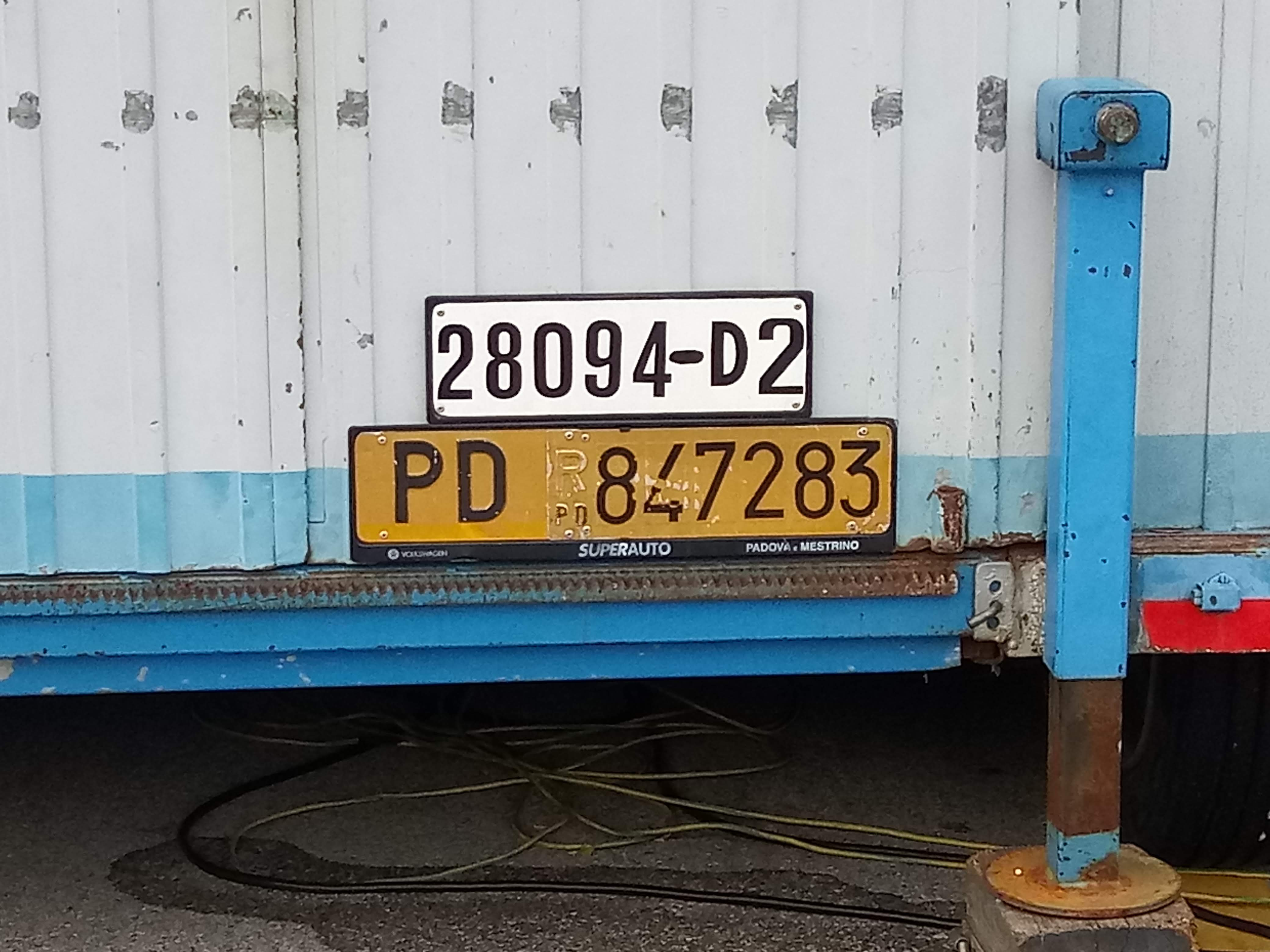 La foto riporta una targa provvisoria alfanumerica (con validità massima 60 giorni) sopra una targa ripetitrice di giostra su rimorchio. Occasione e luogo: piazza Barbato - Ponte di Brenta (PD) - 28/09/2019